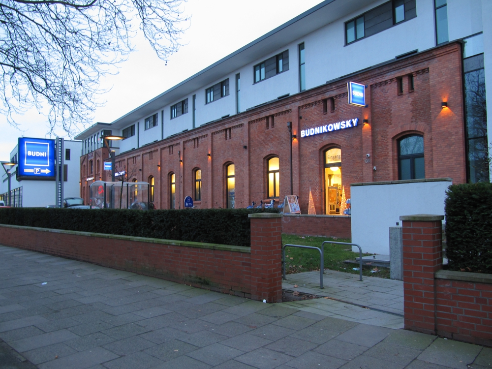 Iwan Budnikowsky, Drogerie-Kette, Filiale Rennbahnstraße 135, Hamburg-Wandsbek